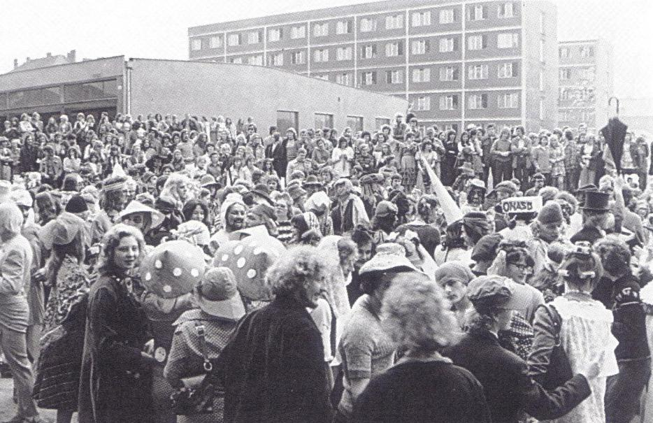 Piastonalia (juwenalia) na kampusie WSP w Opolu w 1979 roku